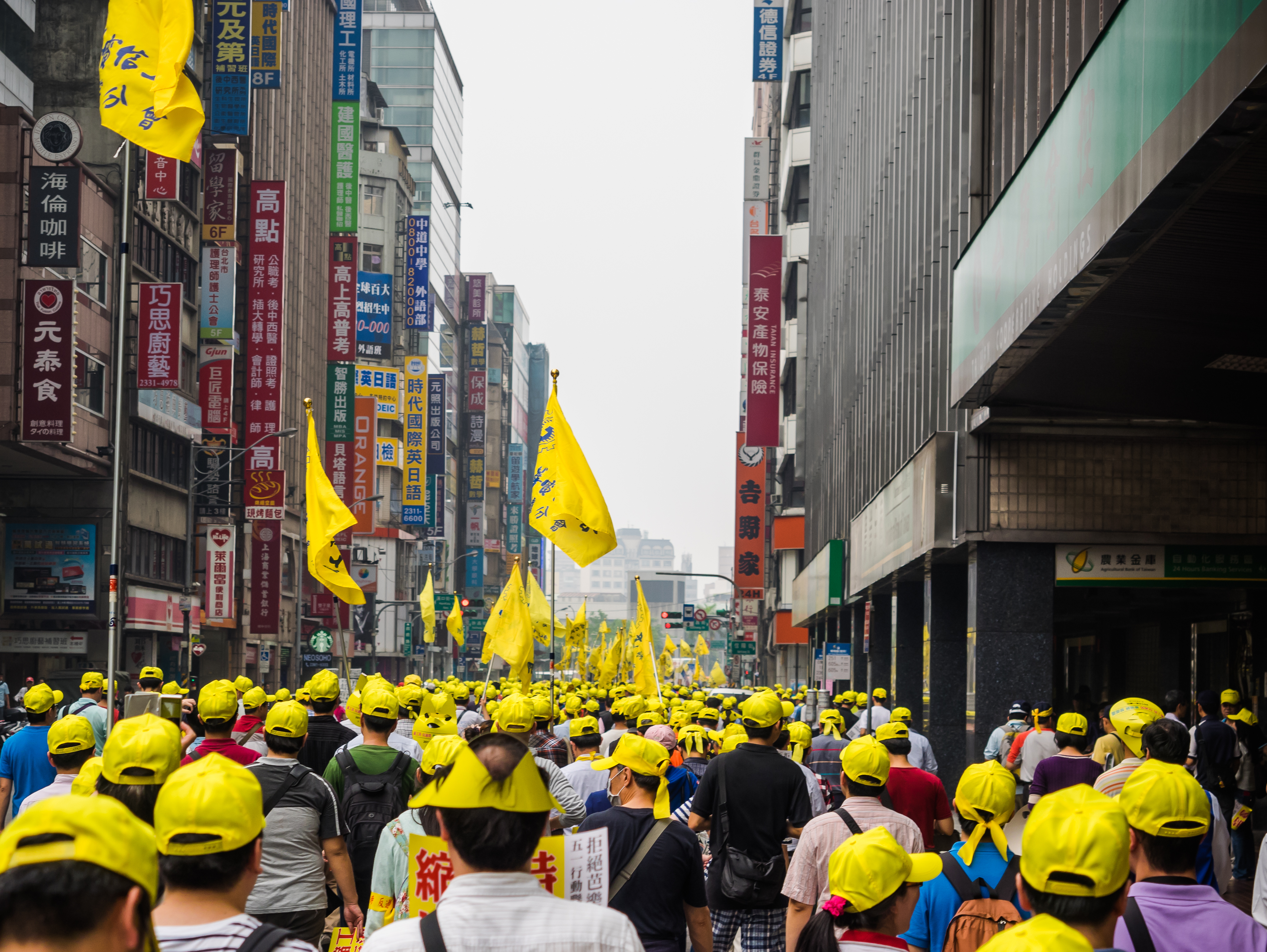 中文（台灣）: 2015五一勞工大遊行，中華電信工會群眾行經臺北市中正區館前路。